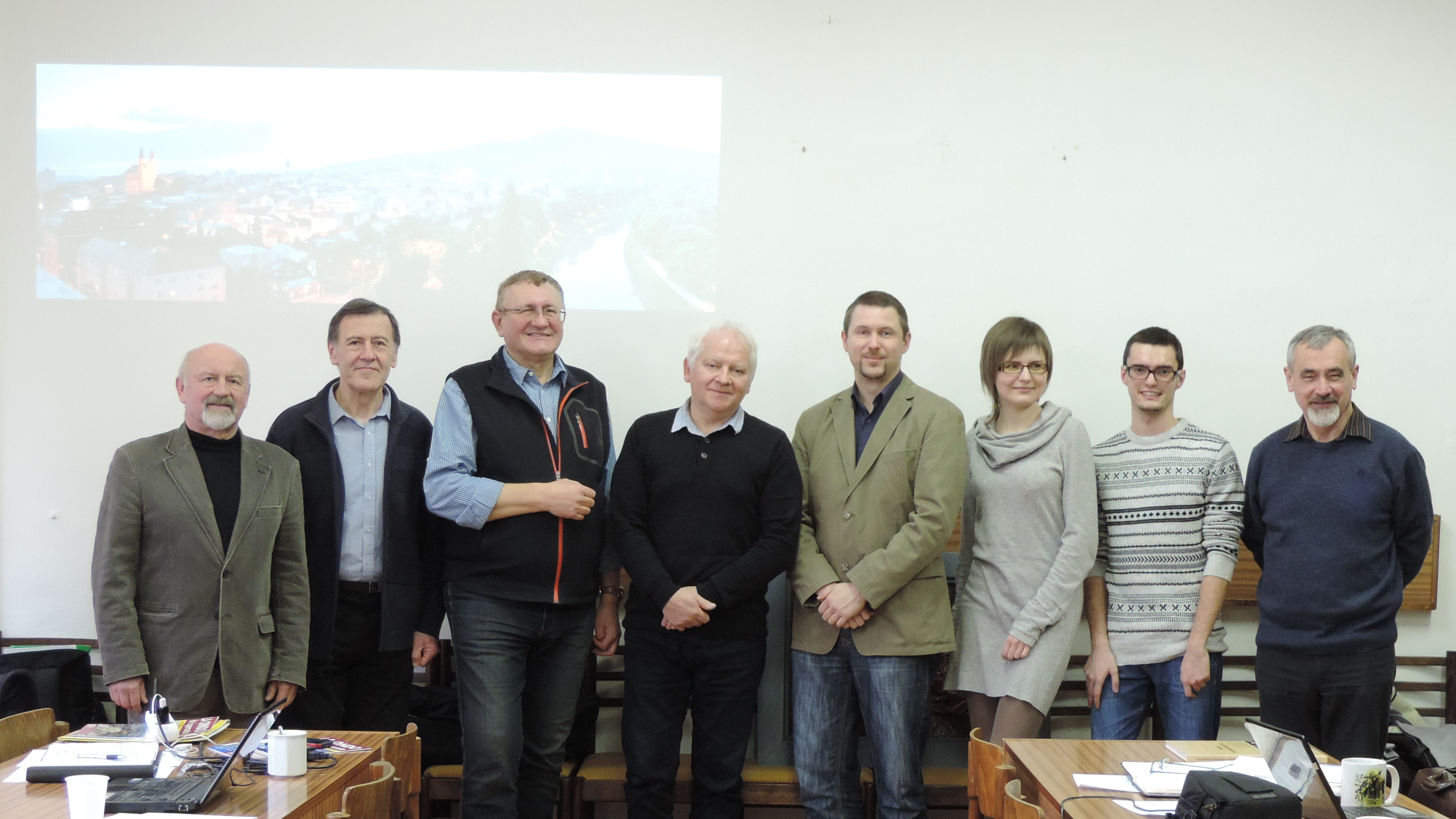 Loka Kongresa Komitato (LKK) de Universala Kongreso de Esperanto (UK) 2016 en Nitra, Slovakio. En la foto mankas Zuzana Pichnarčíková. La LKK estis fotita dum sia kunsido en Nitra en la 17-a de Januaro 2015.